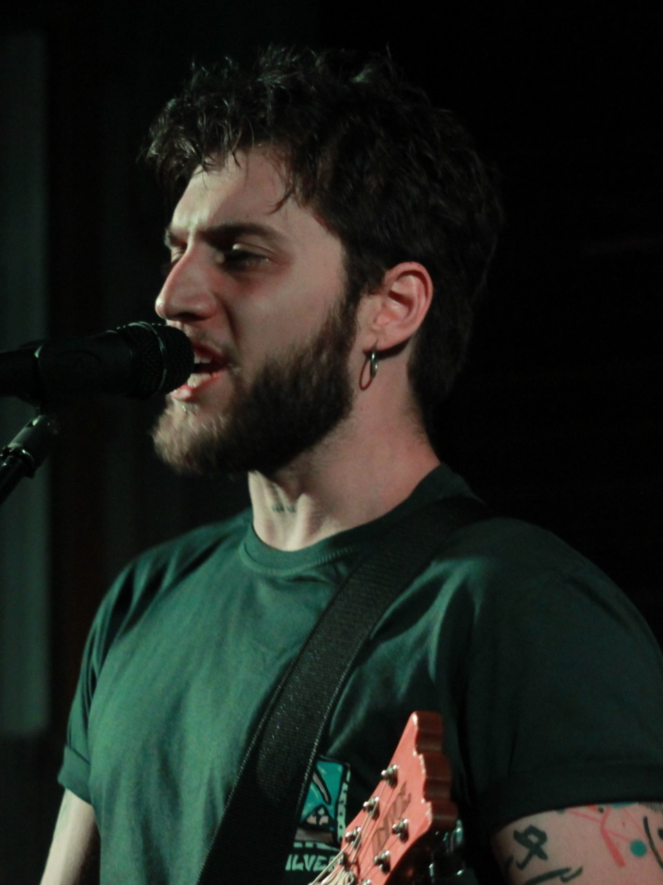 Melis Danişmend, Ufuk Beydemir konserinden.